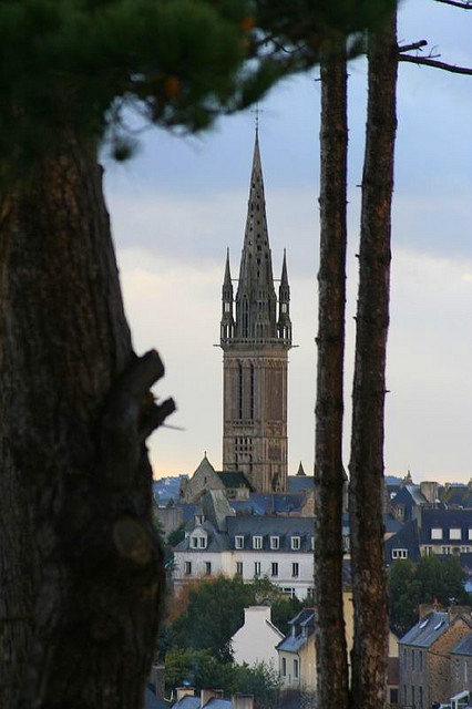 Chapel N-D du Kreisker, in Saint-Pol de Léon, photo P de Labarthe